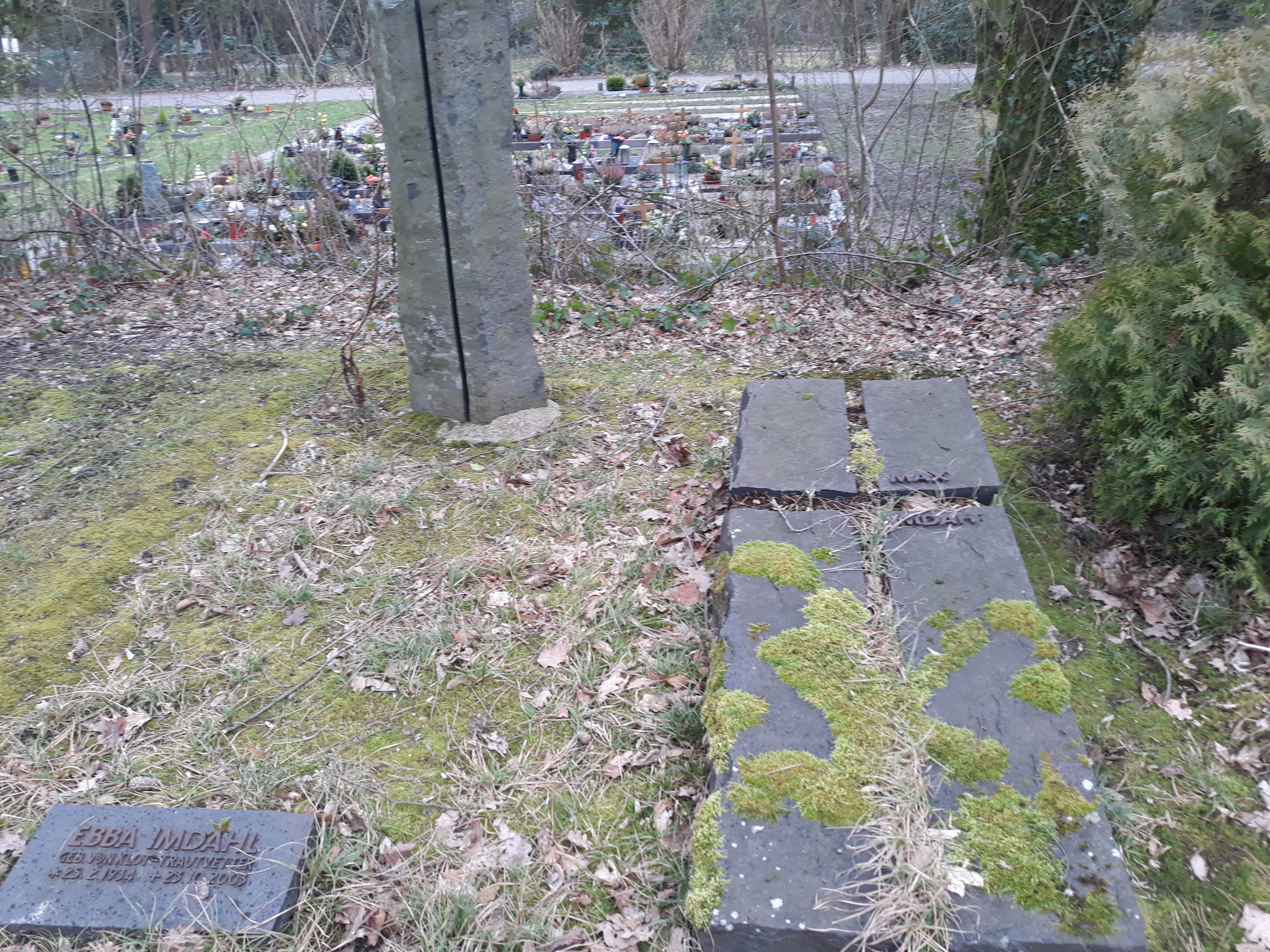 Das Grab des deutschen Kunsthistorikers Max Imdahl und seiner Ehefrau Ebba auf dem Friedhof Querenburg in Bochum.